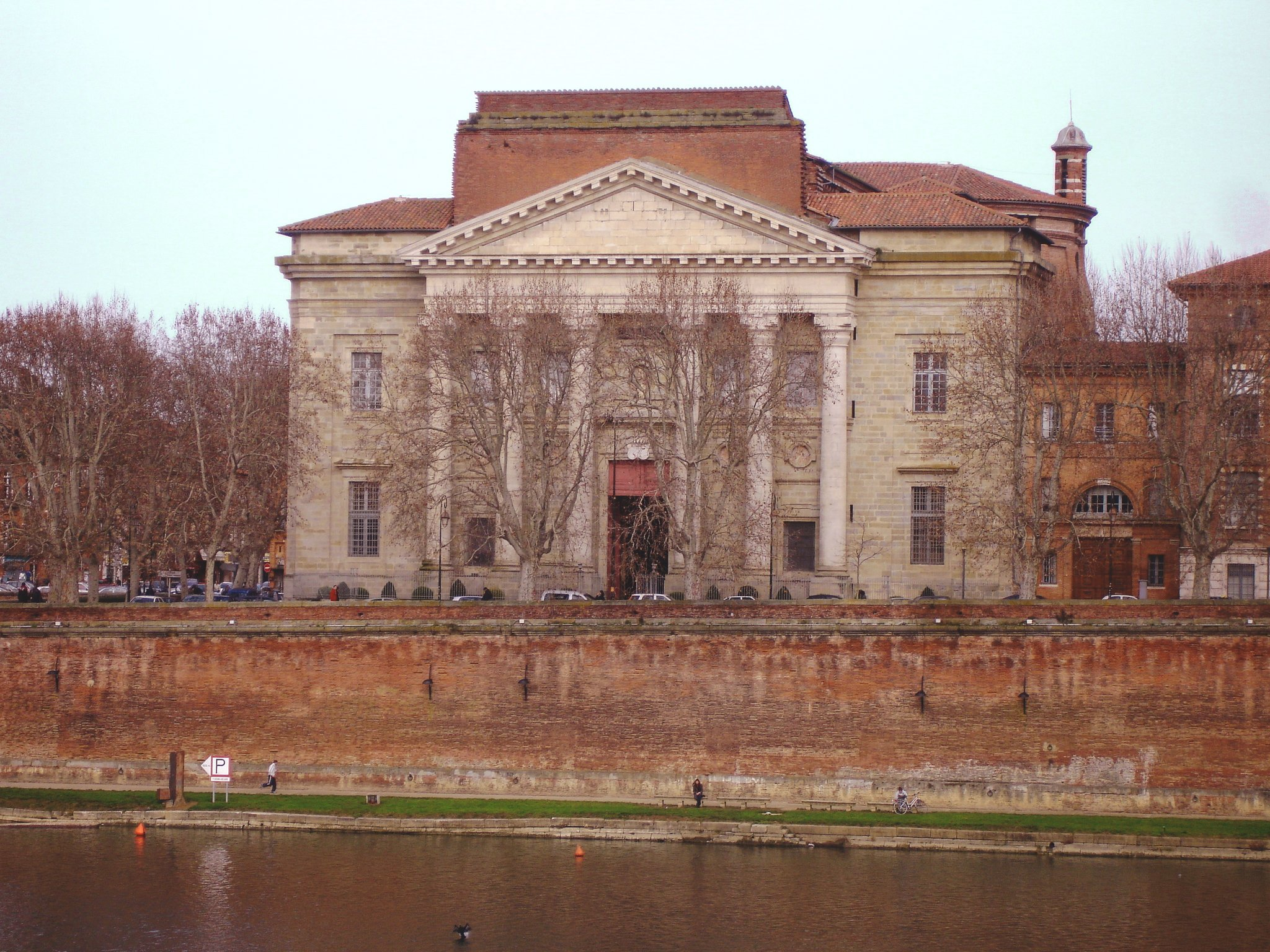 Église Notre-Dame de la Daurade à Toulouse.